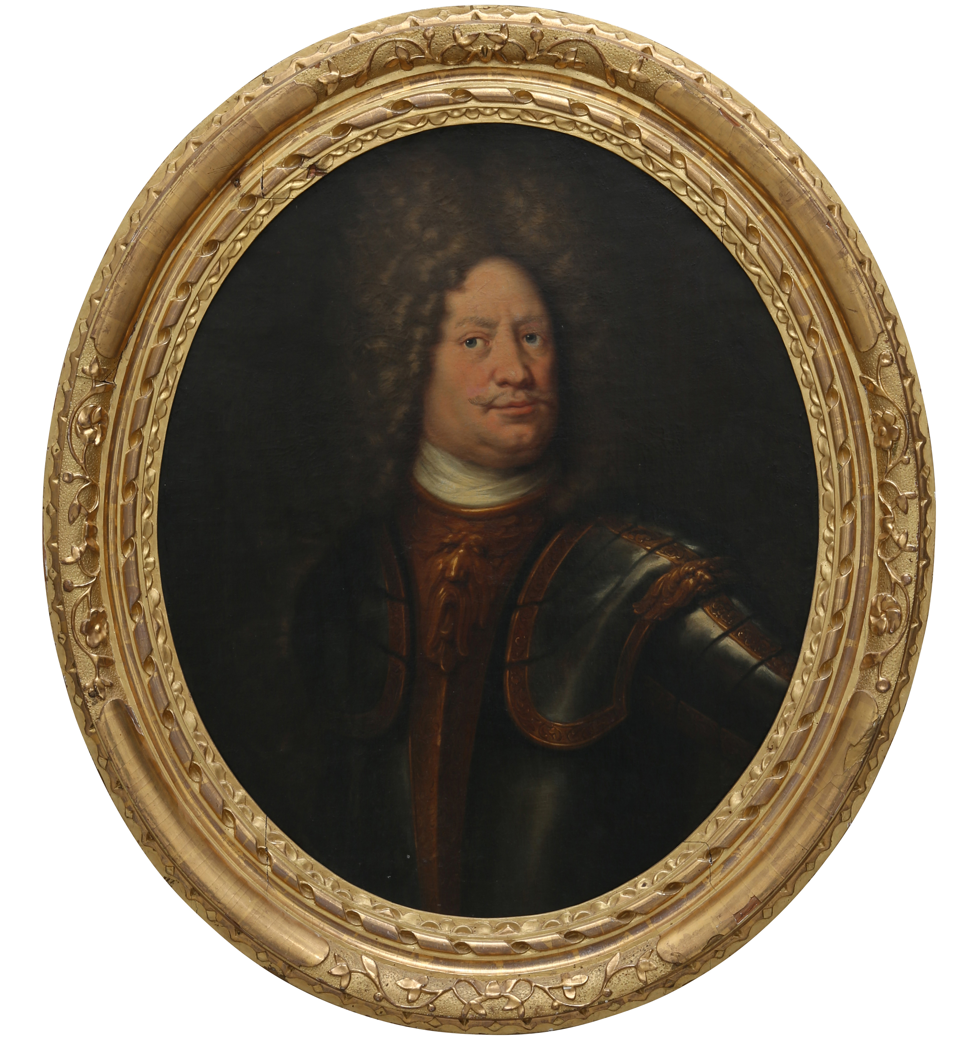 Generallöjtnanten Christian Ludvig von Aschenberg (1662-1722), som till Rutger von Ascheberg. Avporträtterad ca 1690 av David Klöcker Ehrenstrahl.